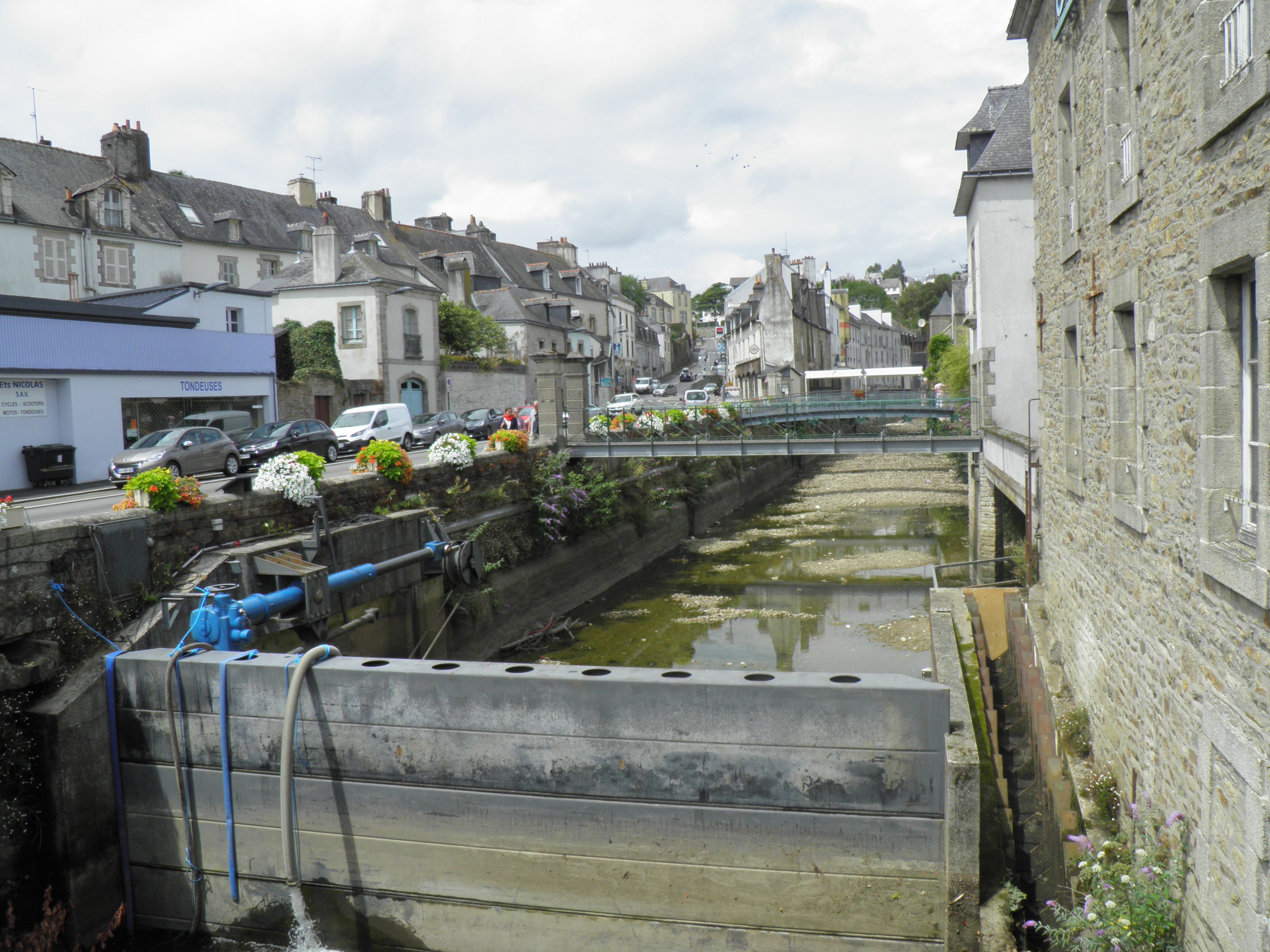 L'aménagement du cours de l'Isole après les inondations de l'an 2000 : installation du clapet mobile et le réaménagement des passerelles à Quimperlé (Finistère, France).